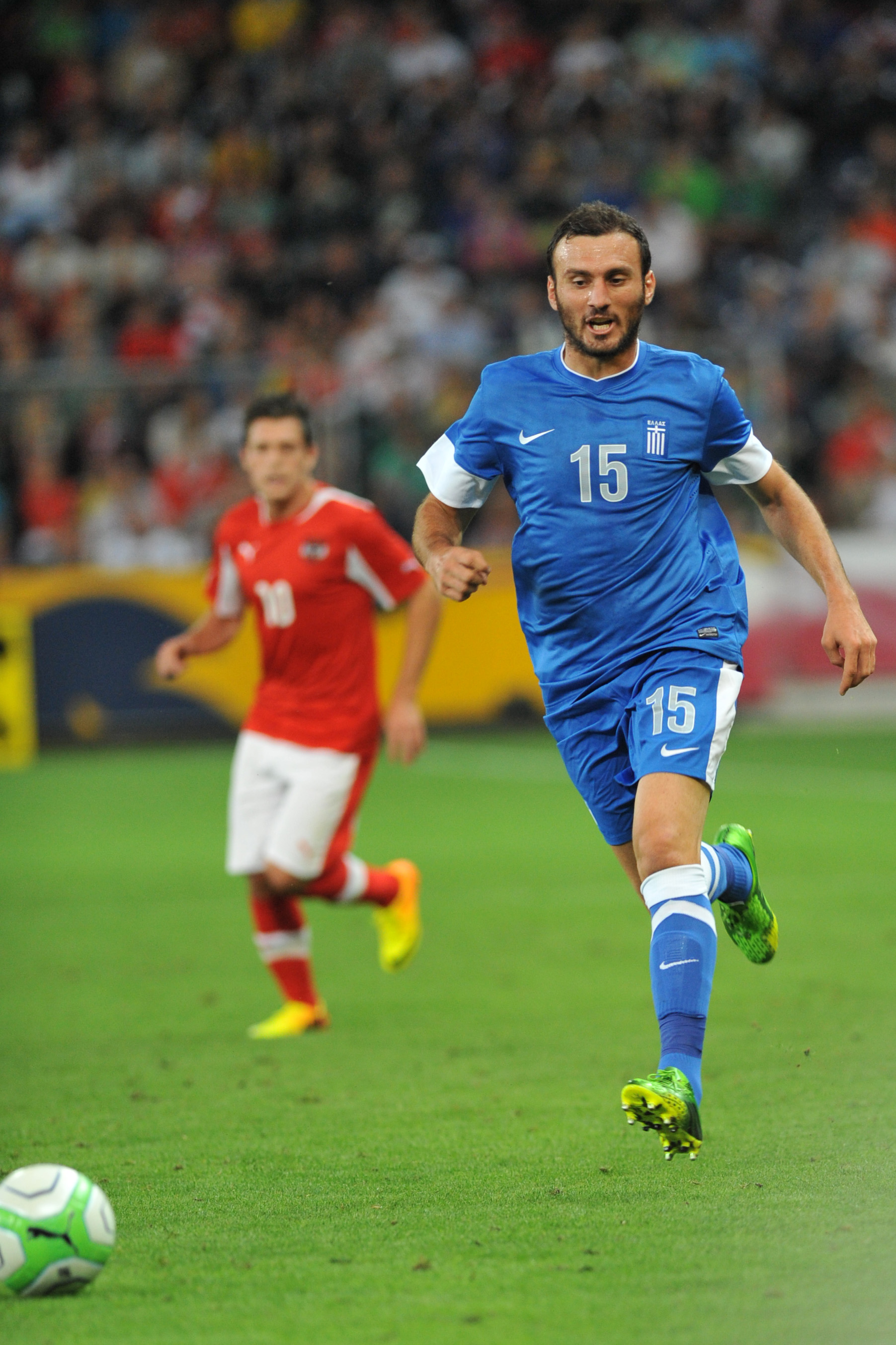 Freundschaftliches Länderspiel Österreich - Griechenland am 14. August 2013 in Salzburg: Vassilis Torosidis